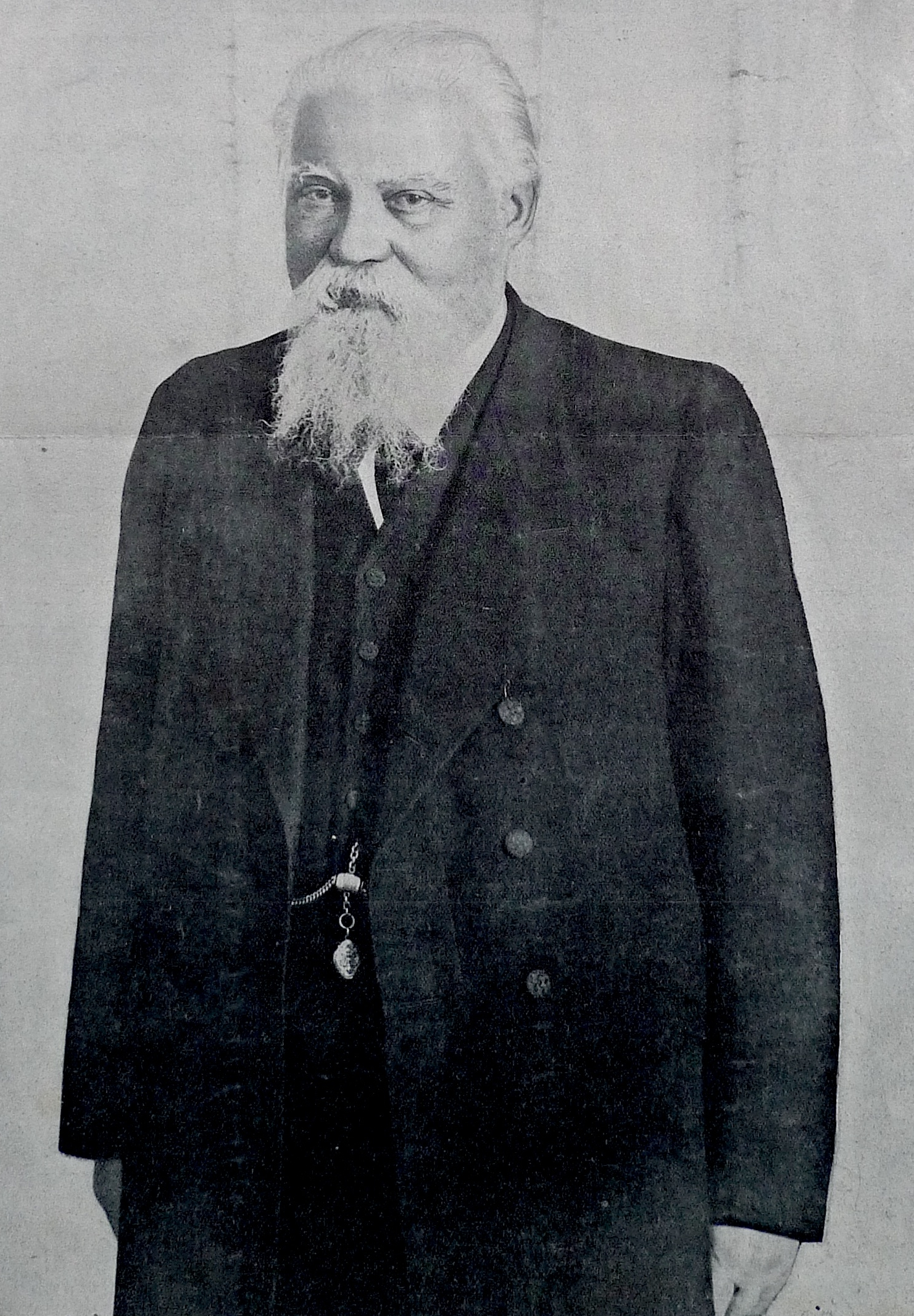 Таганцев, Николай Степанович